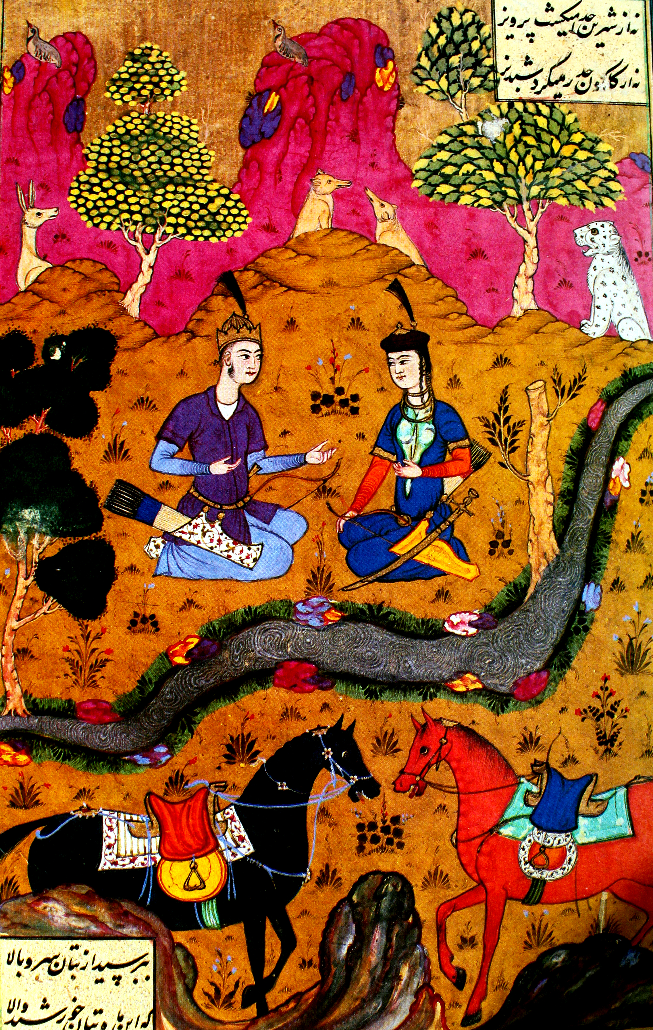 Sevgililərin birinci söhbəti, Buxara, 1648